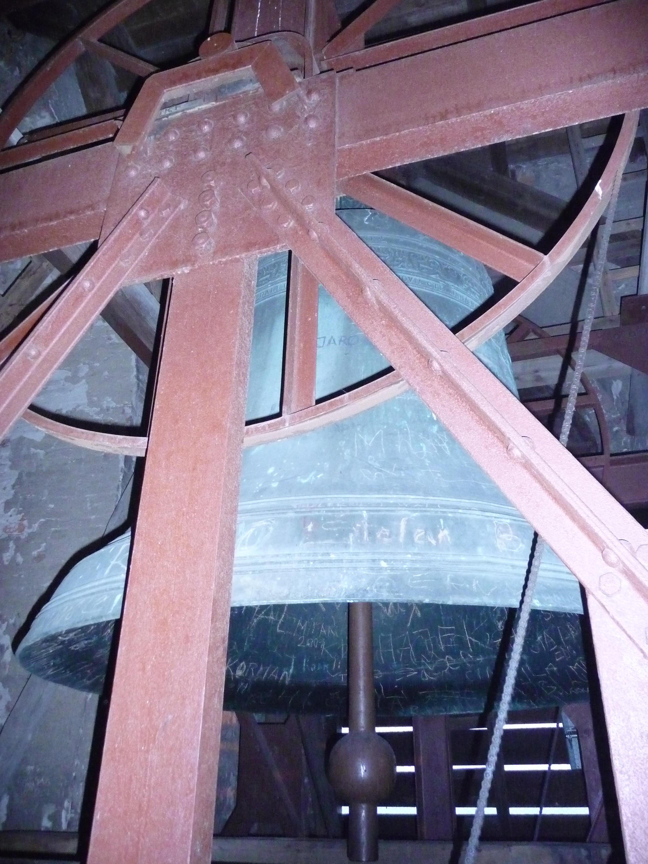 Zvon:4745 kg,195 cm,g/0